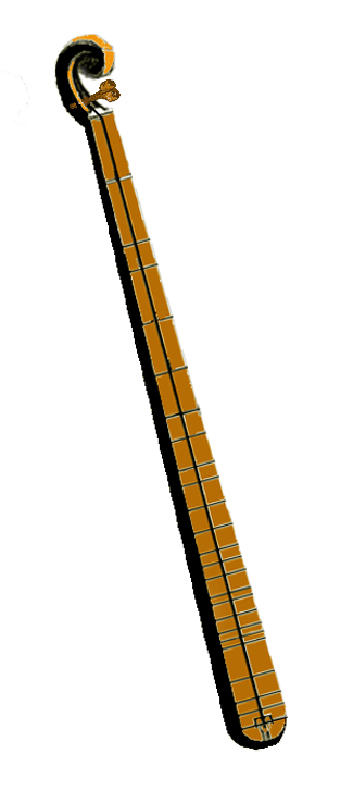 Monocordio. Instrumento de música medieval.